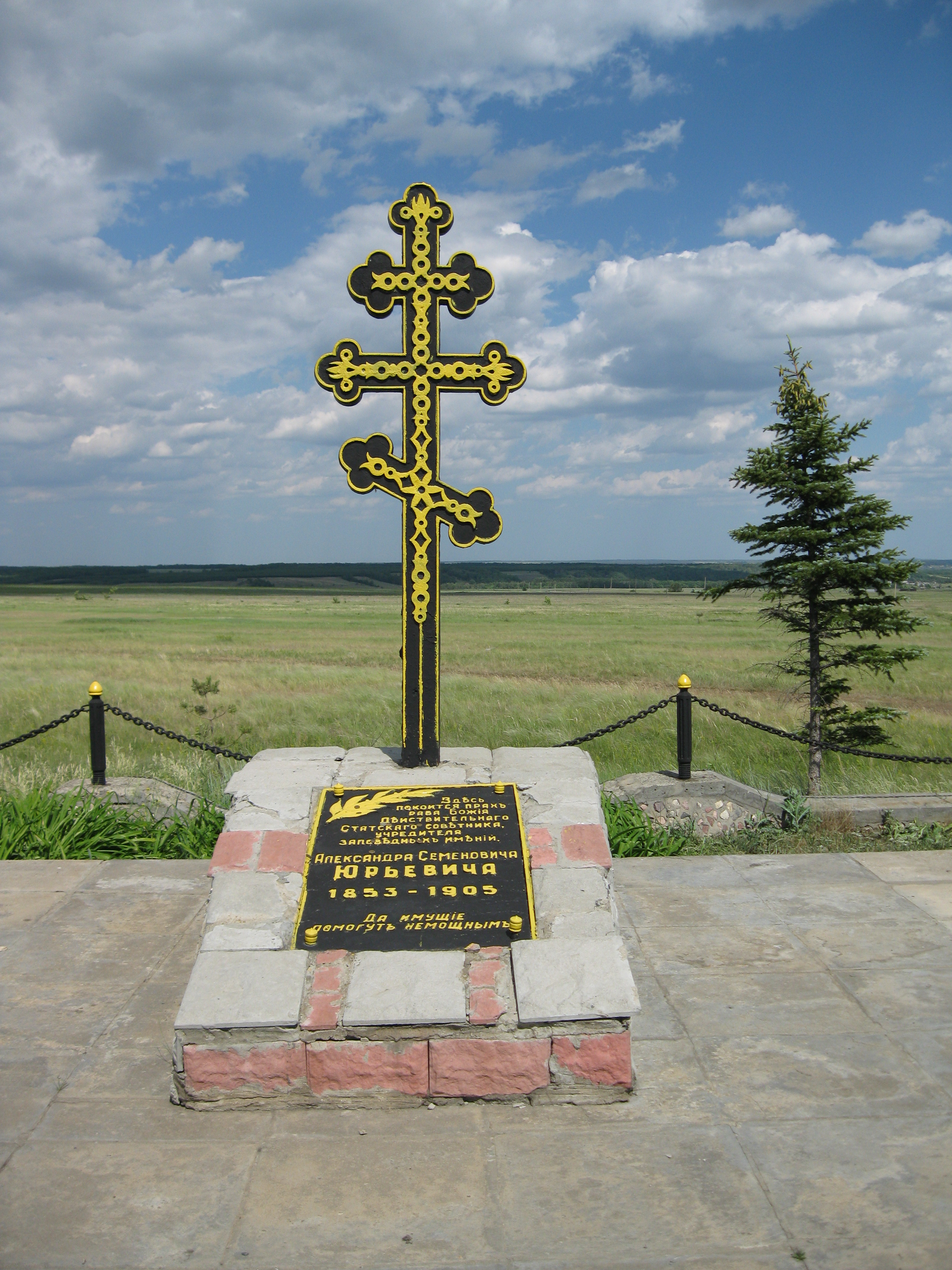 Надгробная плита склепа А.С. Юрьевича